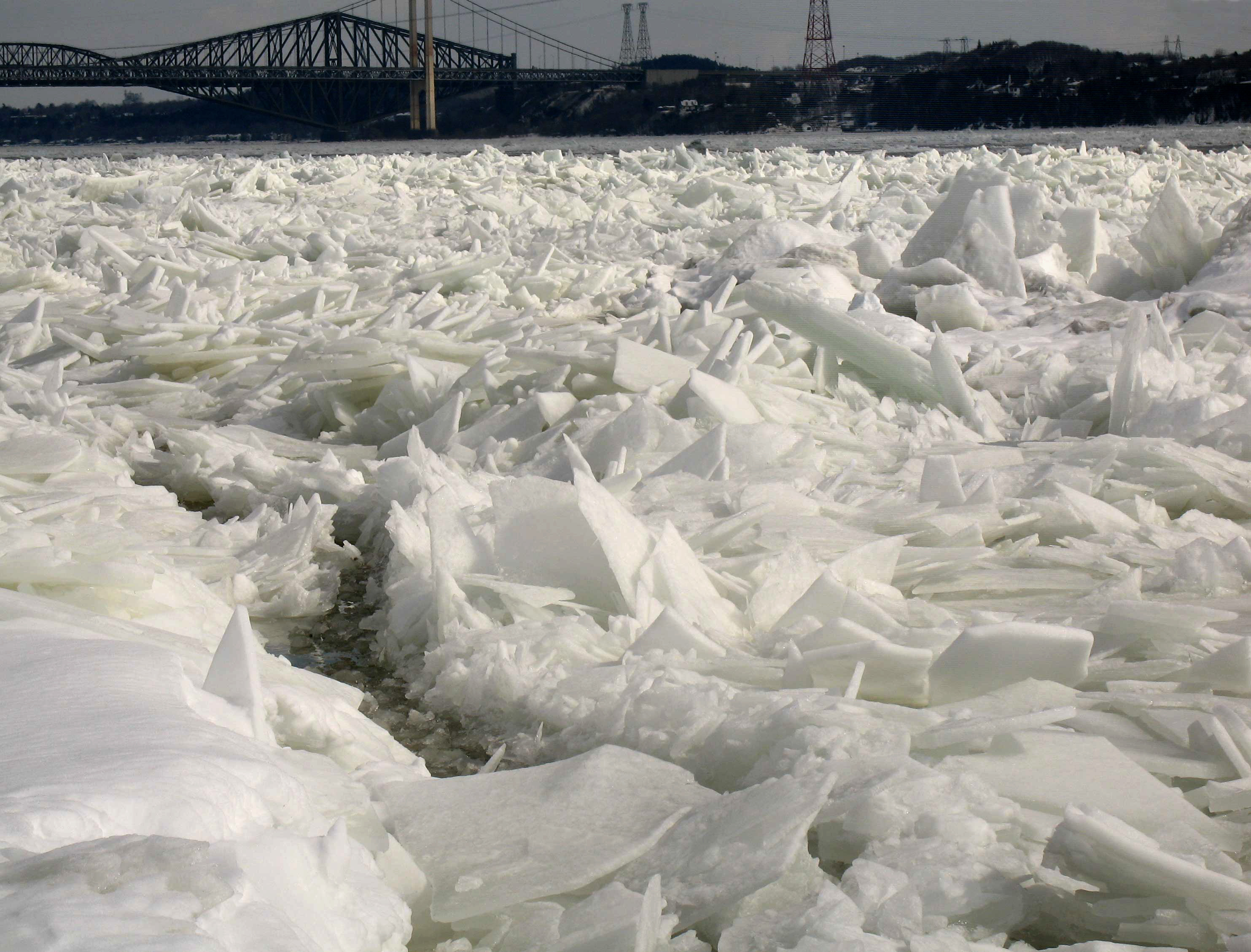 Embâcle sur le fleuve Saint-Laurent aux ponts de Québec. Province de Québec, Canada